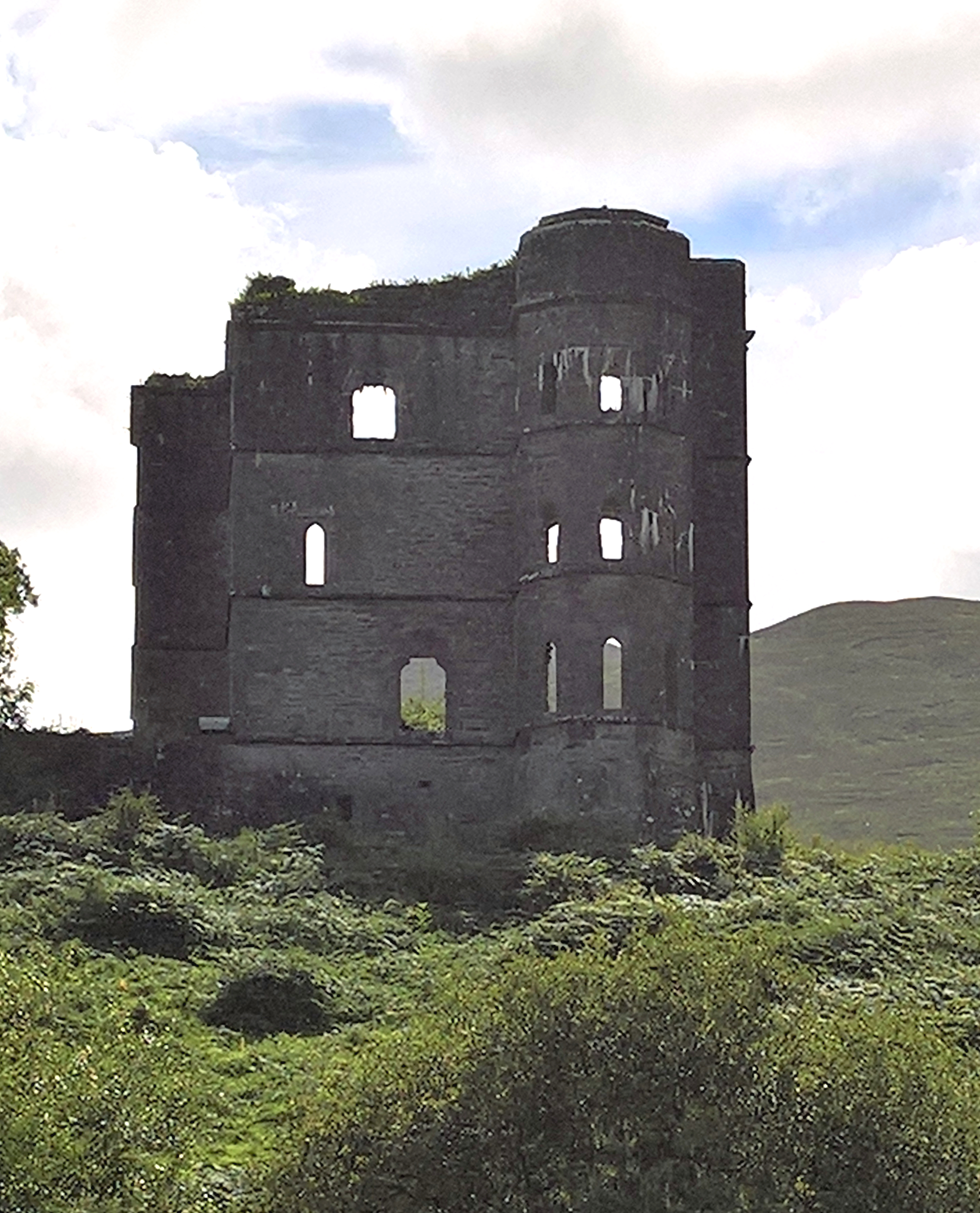 Wynn's Castle (auch Wynne's Folly, Headley Towers oder Glenbeigh Towers Castle) sind die Ruinen eines burgähnlichen Schlosses für Lord Headley Wynn(e) südlich des Ortes Glenbeigh und östlich der Bundesstraße N70 (Ring of Kerry), auf der Iveragh Halbinsel (Uíbh Ráthach) in der Gälischen Region (Irisch sprechend) des County Kerry in Irland. Blick nach Osten, N70 zur Schlossruine